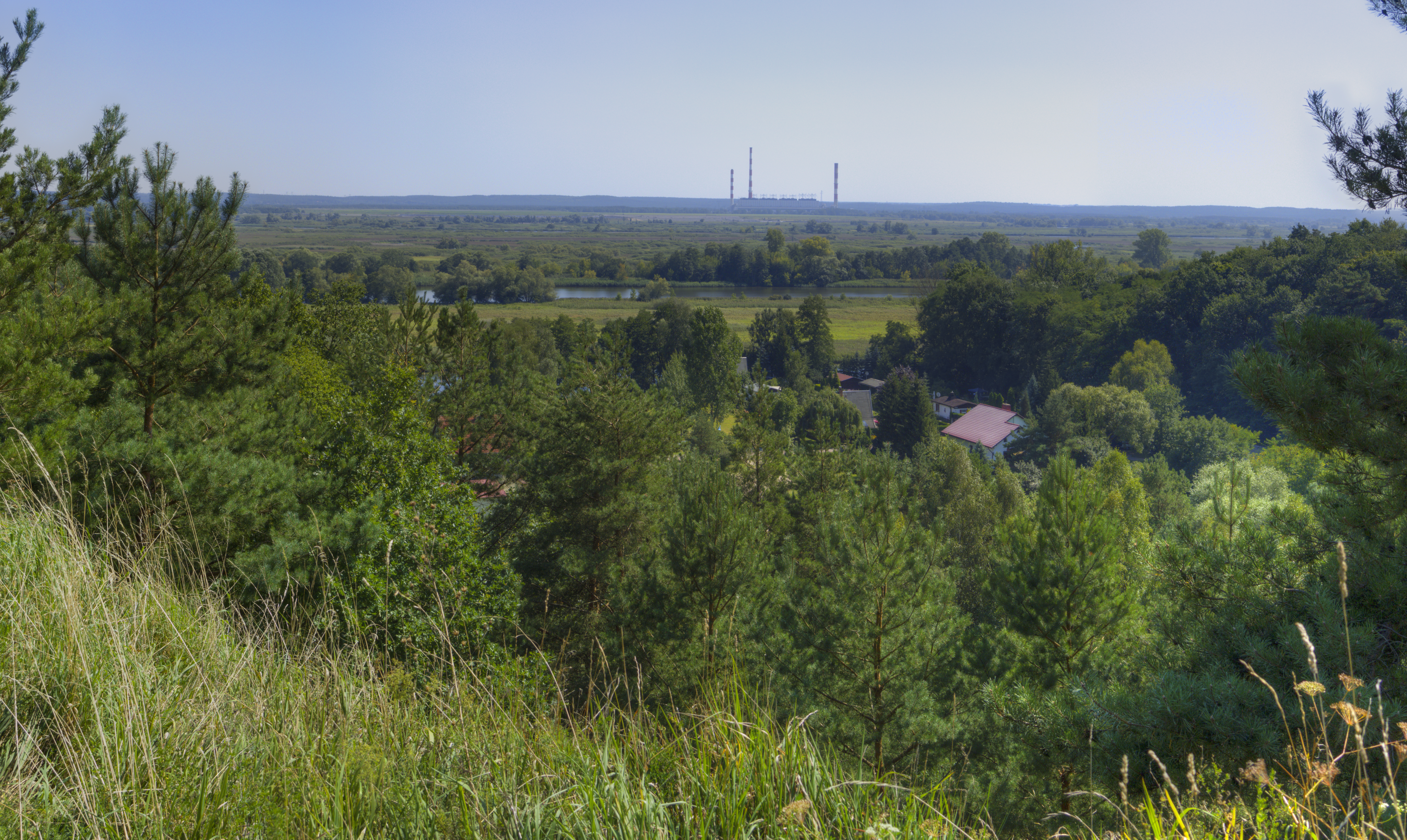 Kohlekraftwerk bei Gryfino und Blick auf Nationalpark Unteres Odertal